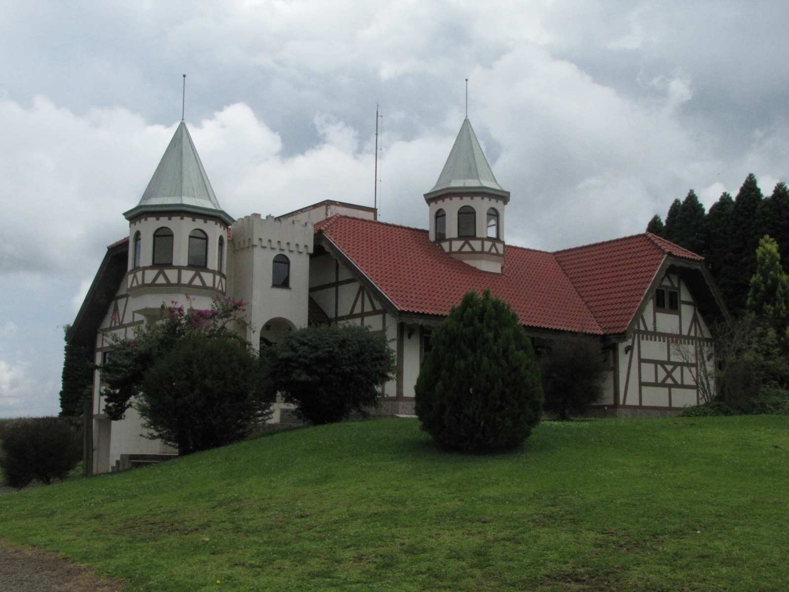 Arquitetura Típica em Entre Rios - Guarapuava